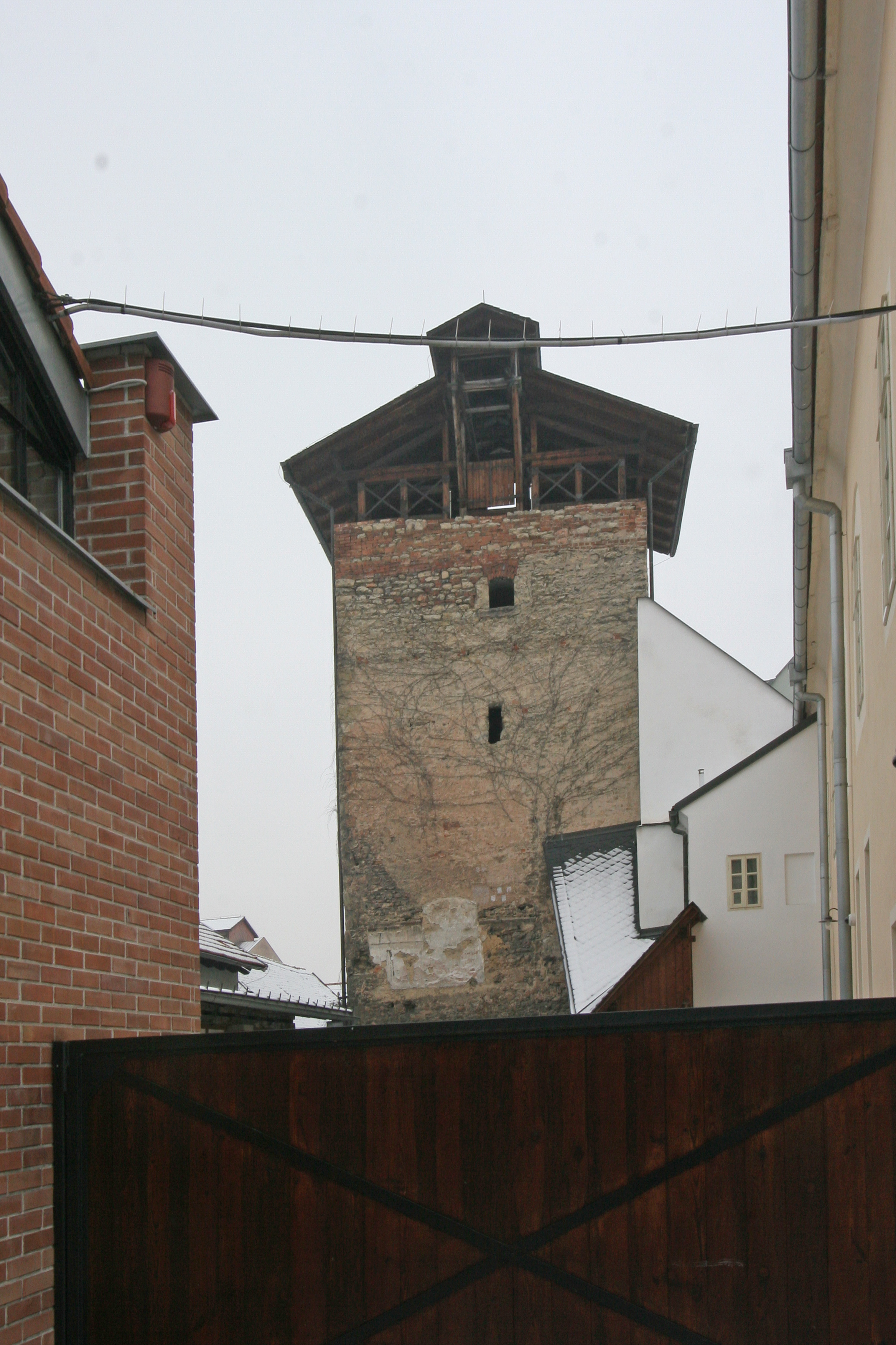 městské opevnění Litomyšl - Červená věž, východní část města, Litomyšl